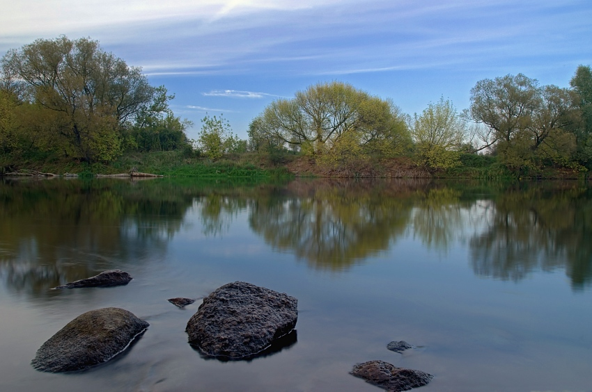 Warta przepływająca wczesną jesienią przez Luboń